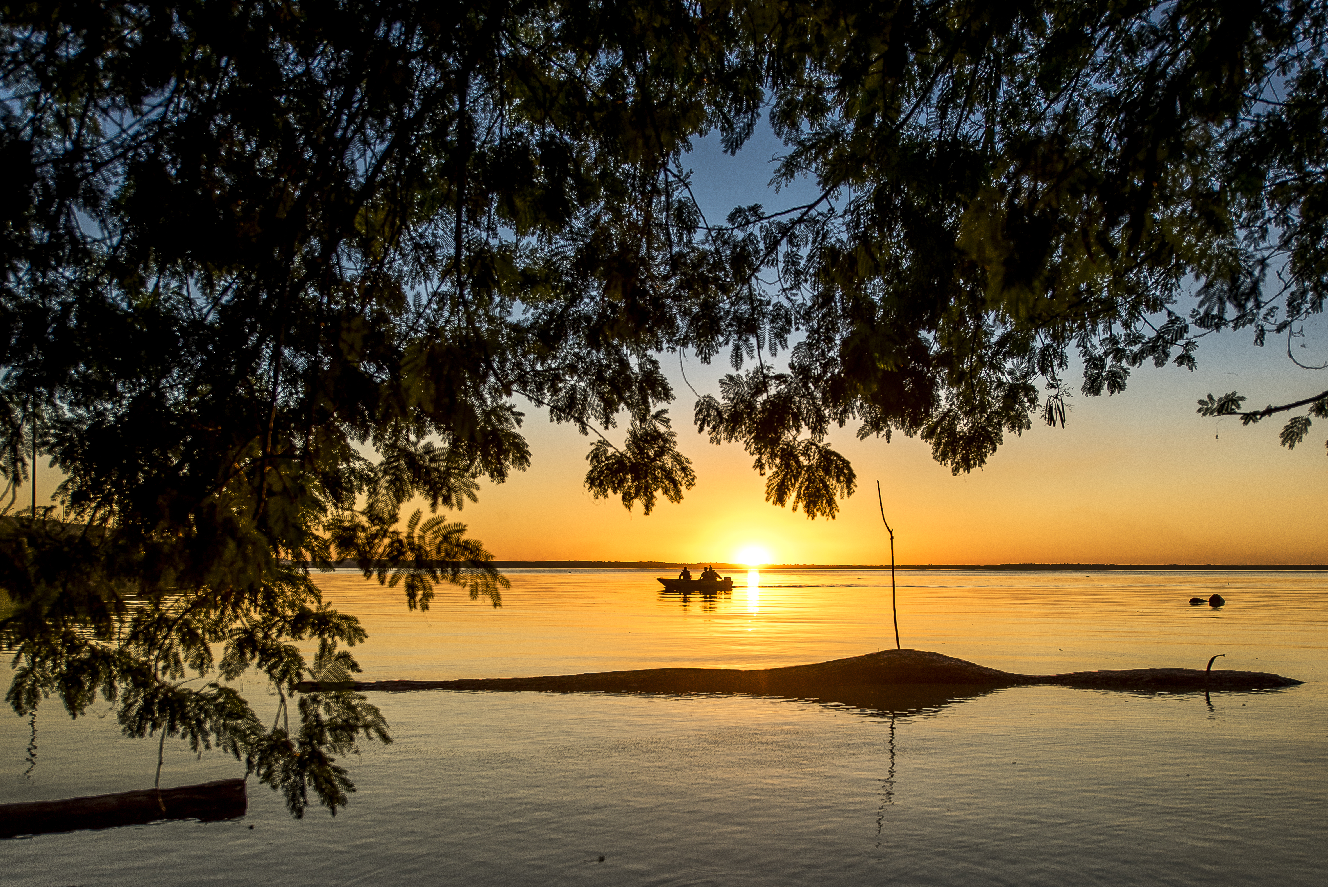 Rio Tocantins, em Palmas.